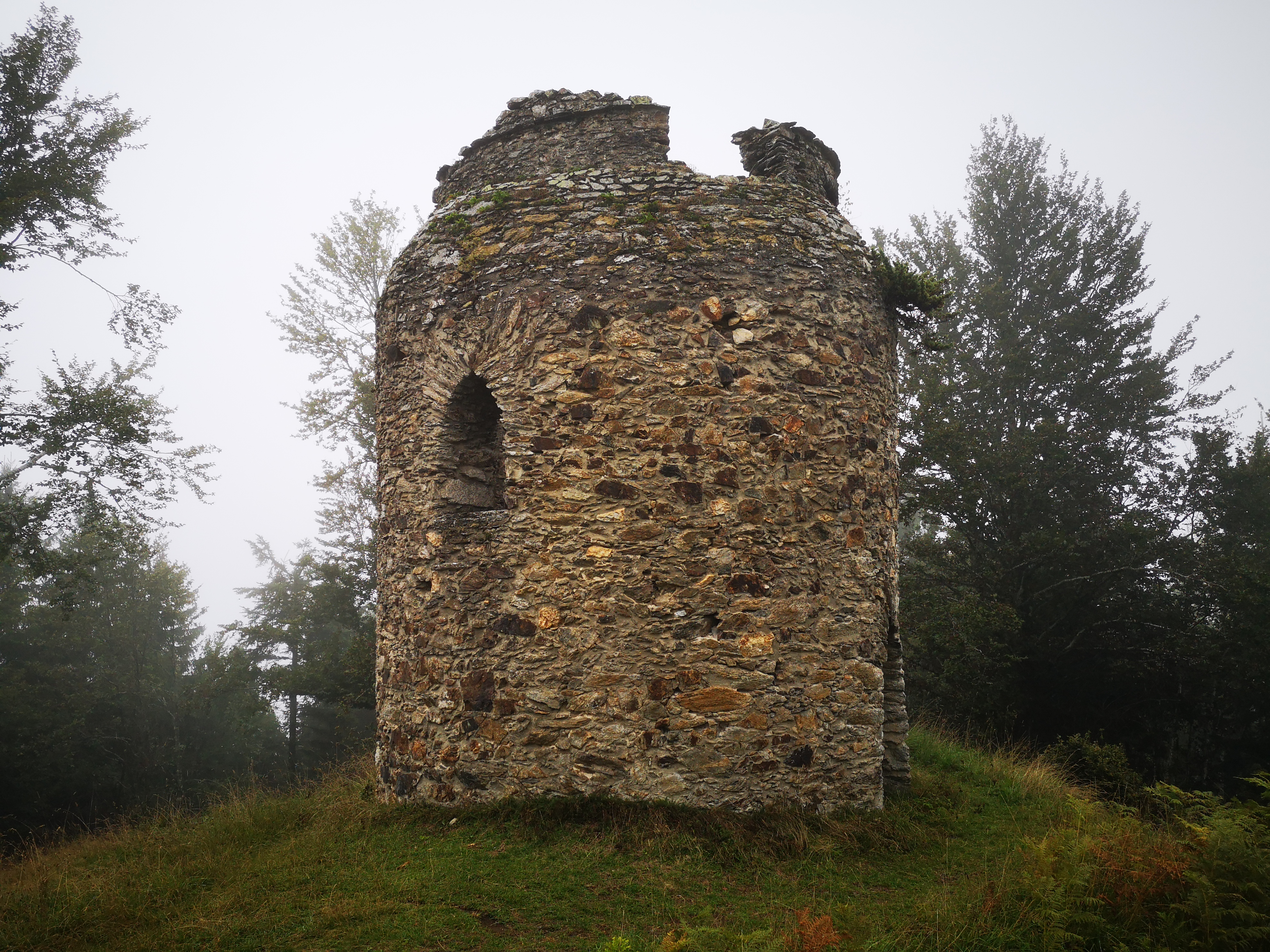 Tour Laffont à Sentenac-de-Sérou (Ariège, France).